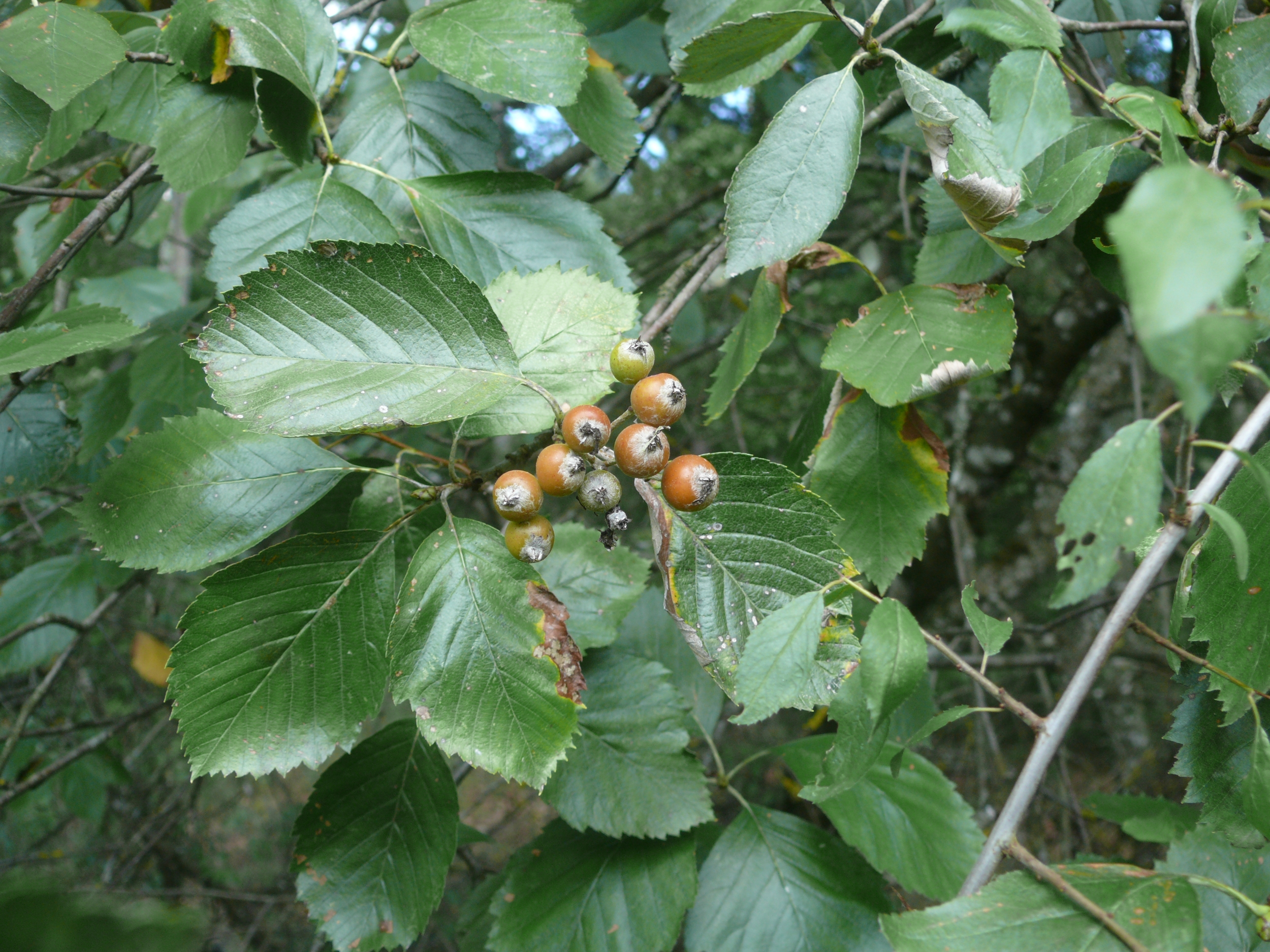 Sorbus meierottii, südliche Frankenalb